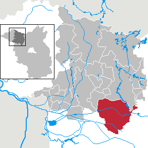 Fehrbellin in Brandenburg (Country) - District Ostprignitz-Ruppin